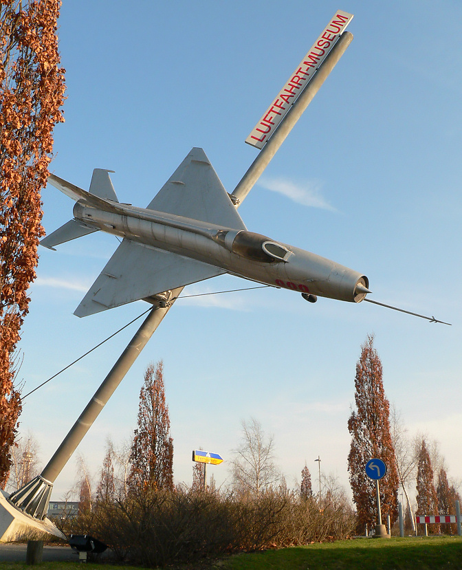 Reklameschild Luftfahrtmuseum in Laatzen